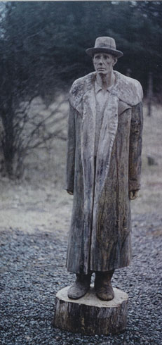 Joseph Beuys, Oak 2005, Robert Bosch Stiftung Stuttgart, Germany